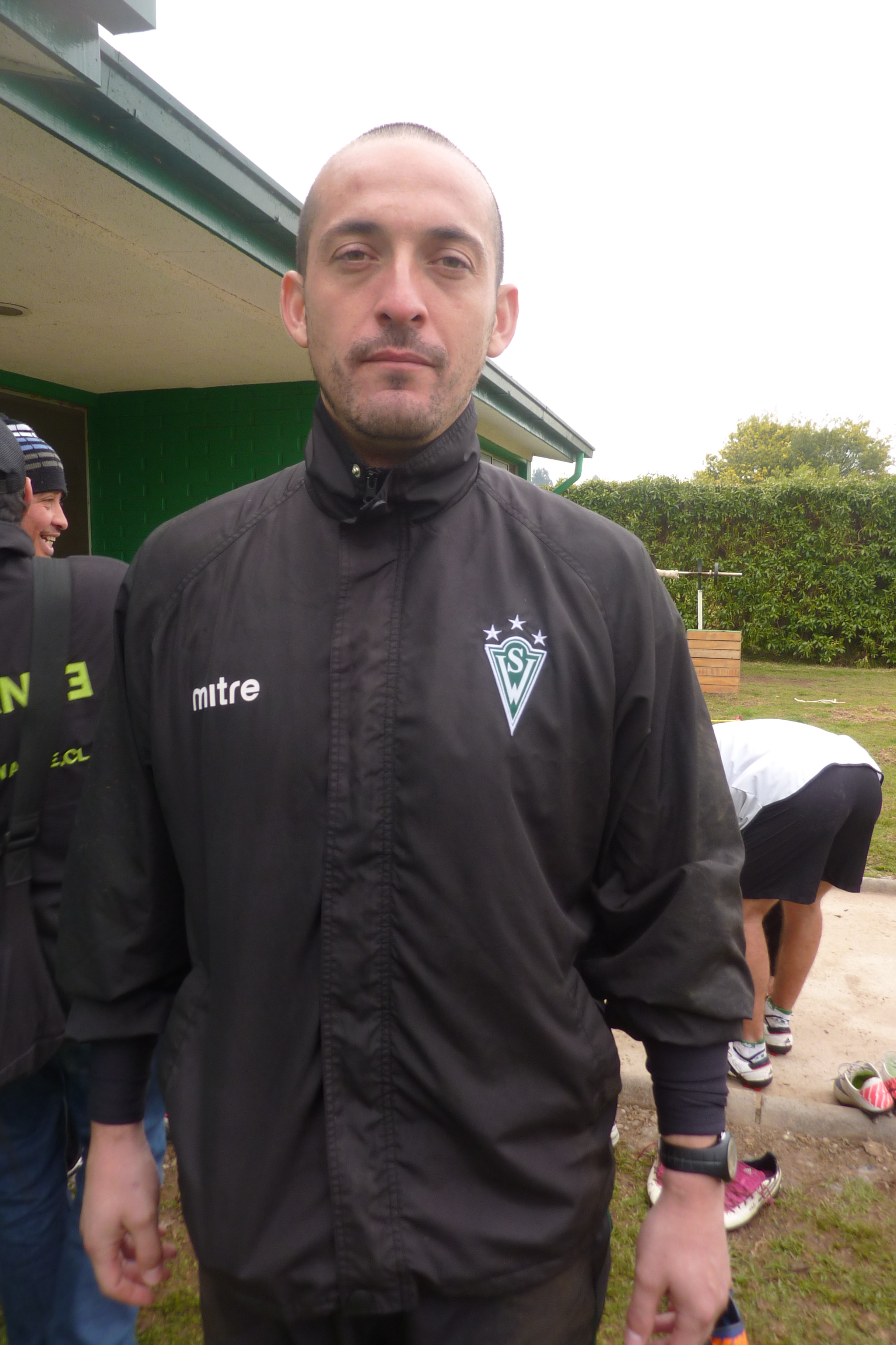 Fotografía de Eduardo Lobos, actual jugador de fútbol chileno del Santiago Wanderers de Valparaíso que se encuentra a prestamo desde Colo-Colo.